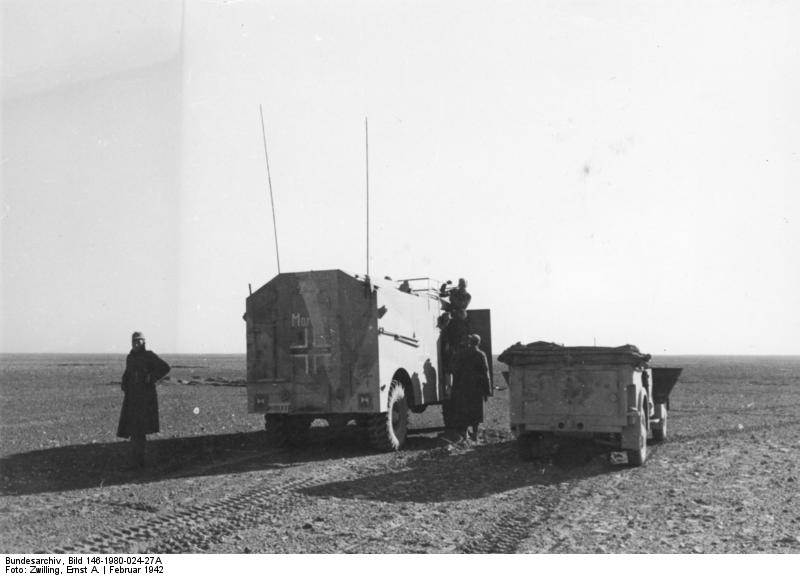 Der "Mammut-Moritz", der Befehlswagen von Generaloberst Rommel, befindet sich in dauerndem Panzerbegleitschutz mitten unter der kämpfenden Truppe. Nur so ist eine schnelle und sichere Uebermittlung sämtlicher Befehle an die in unmittelbarer Nähe gelegenen Einheiten gewährleistet. 25.2.42 [Herausgabedatum]